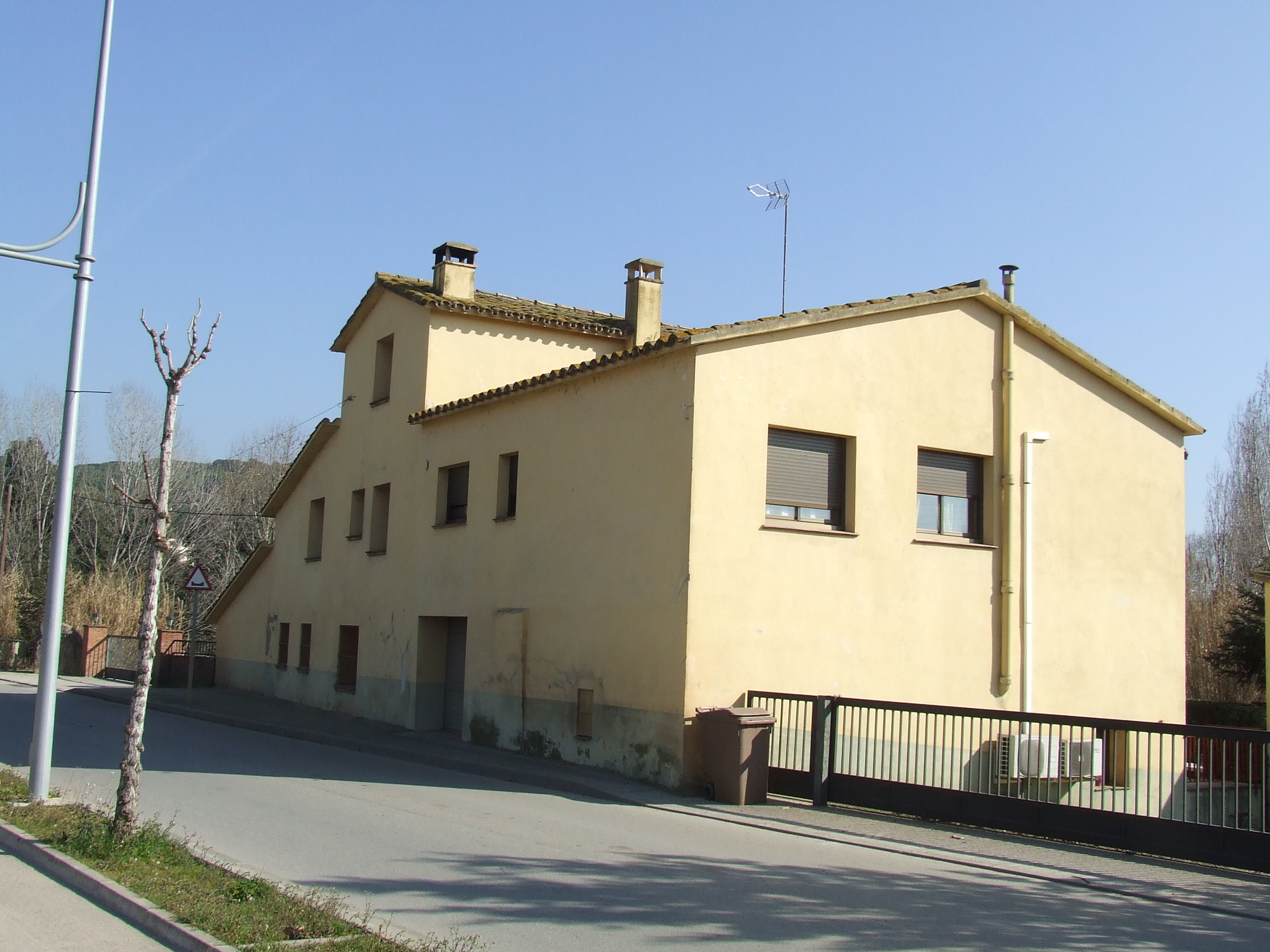 Can Coix (Bigues, Bigues i Riells, Vallès Oriental).